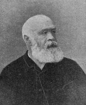 Вильгельм Генкель (Василий Егорович Генкель; нем. Wilhelm Henckel; 1825—1910) — российский и германский переводчик и издатель.